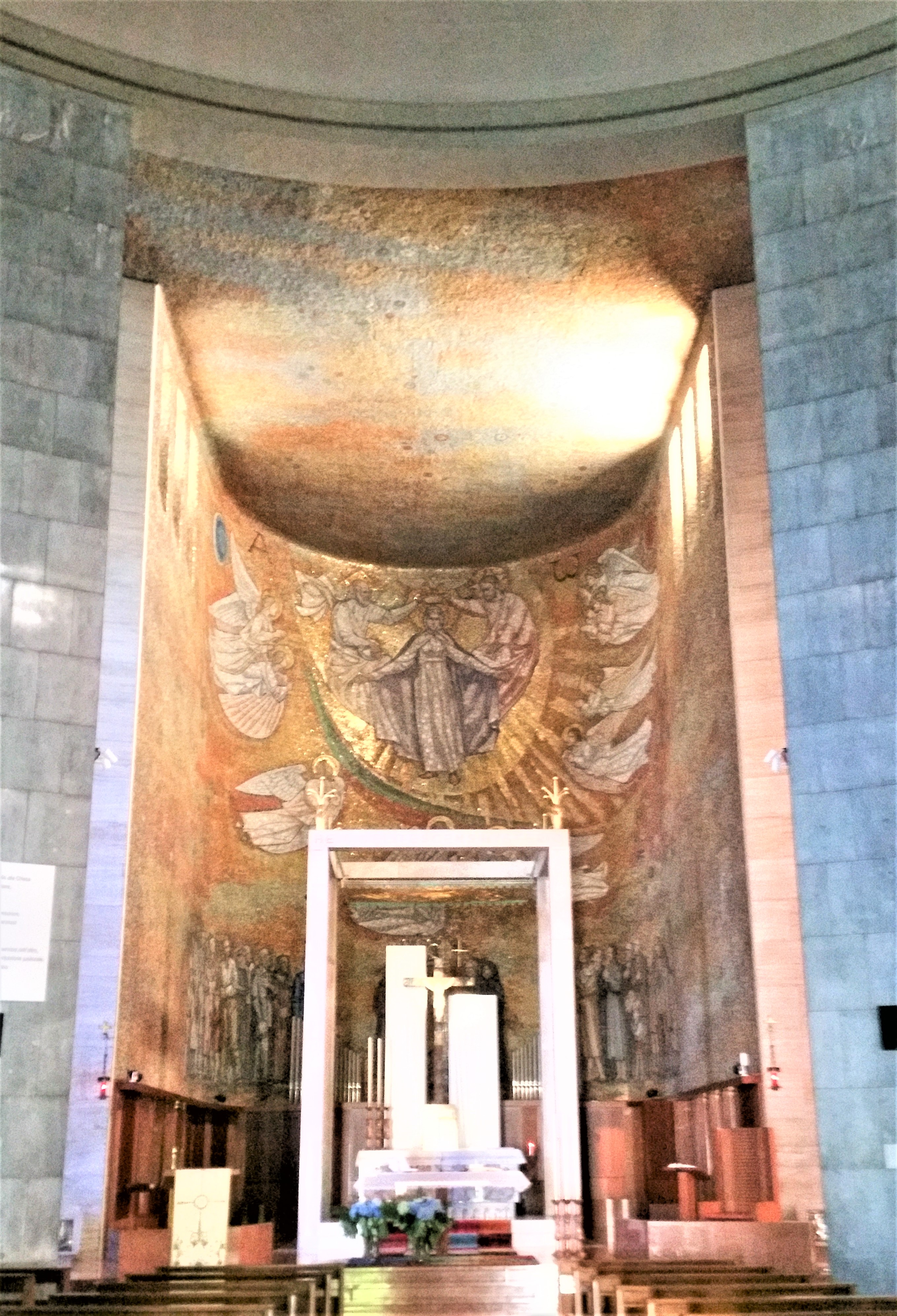 altare maggiore con mosaici della chiesa di santa Lucia